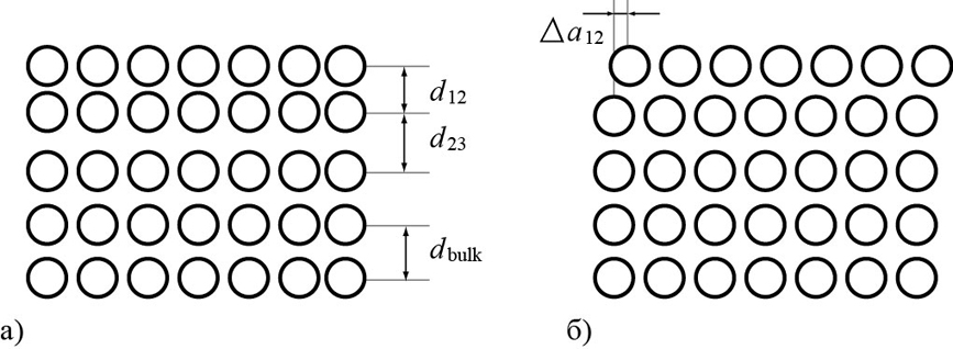 Схематическая иллюстрация нормальной (а) и латеральной (б) релаксаций верхнего атомного слоя полубесконечного кристалла.